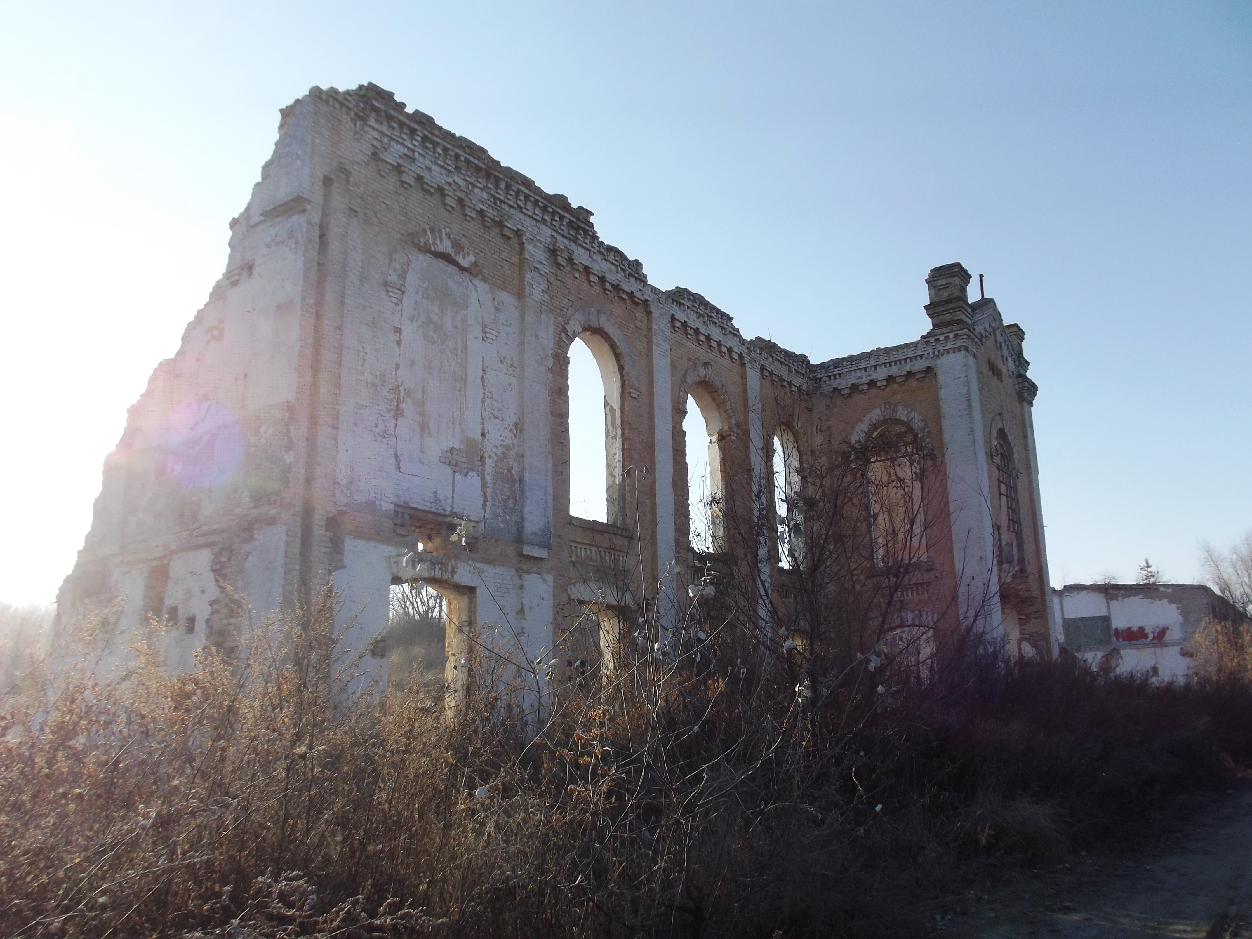 Руїни цукрового заводу у селі Мартинівка Канівського району Черкаської області